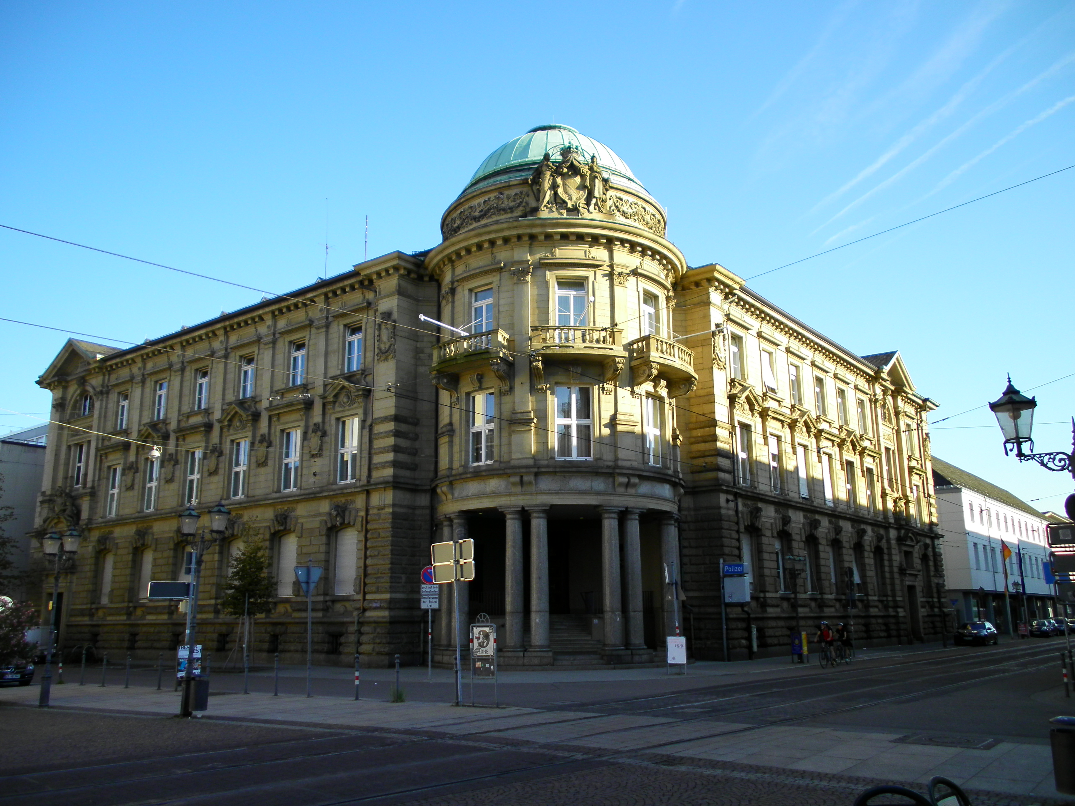 Großherzoglich Badische Bezirksamt heute Polizeirevier Marktplatz, Karlsruhe, Karl-Friedrich-Straße 15 , 76133 Karlsruhe